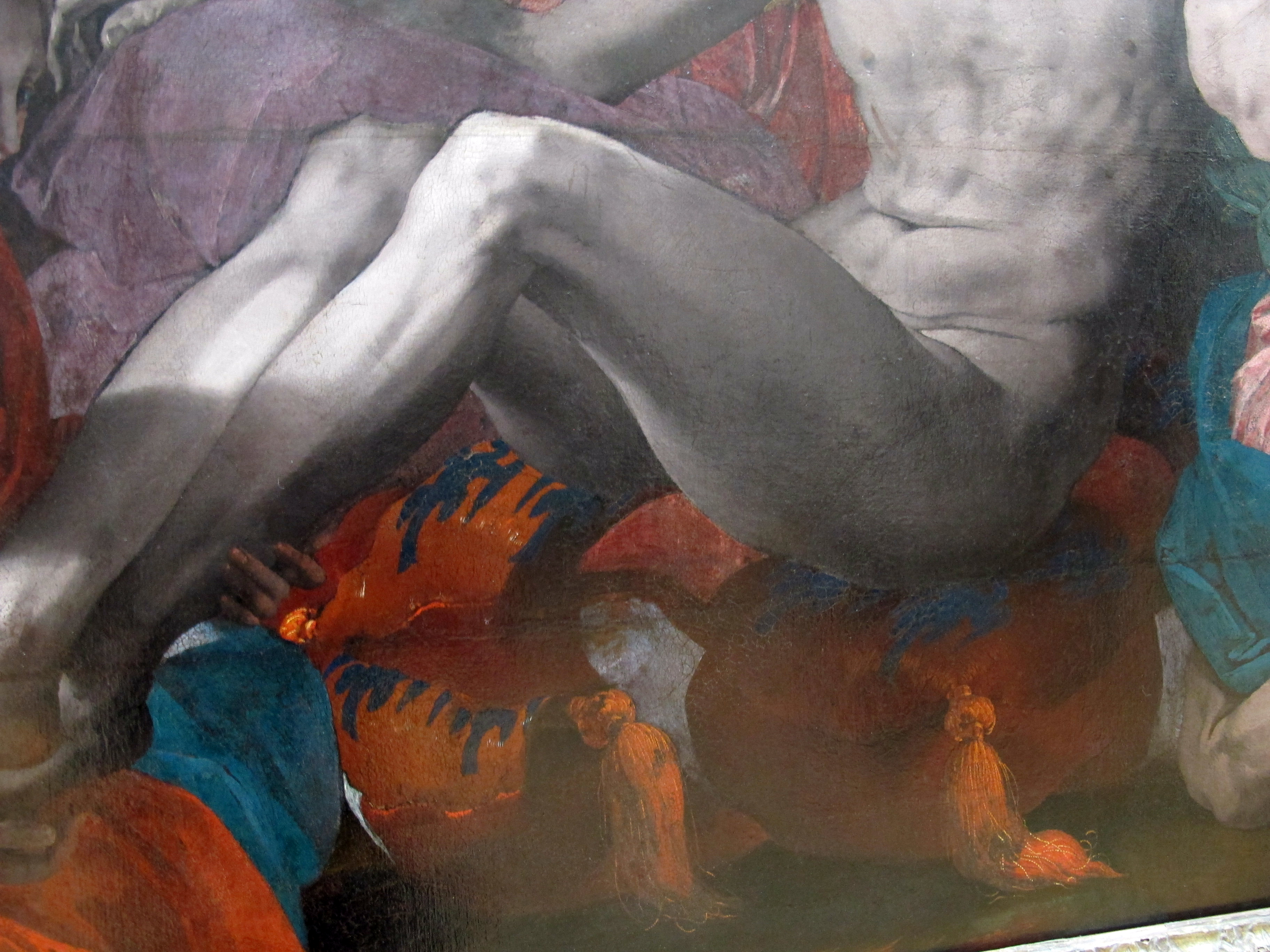 Pittura italiana del Cinquecento, Louvre